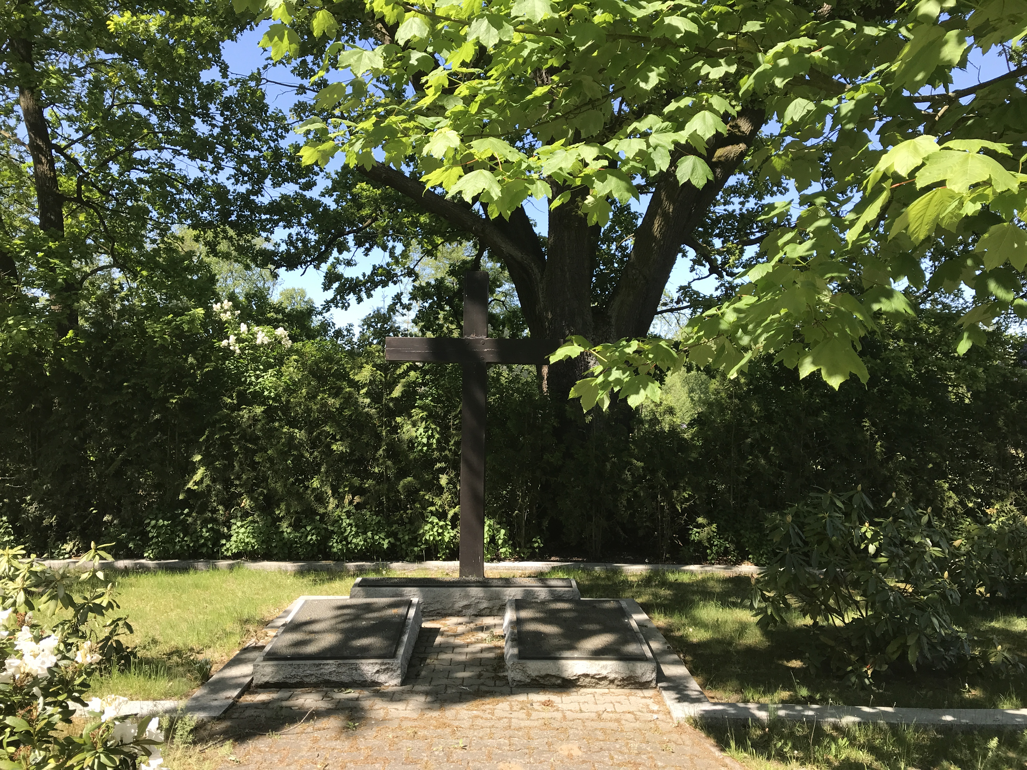 Kriegsgräberstätte auf dem Friedhof in Gottow, einem Ortsteil der Gemeinde Nuthe-Urstromtal in Brandenburg